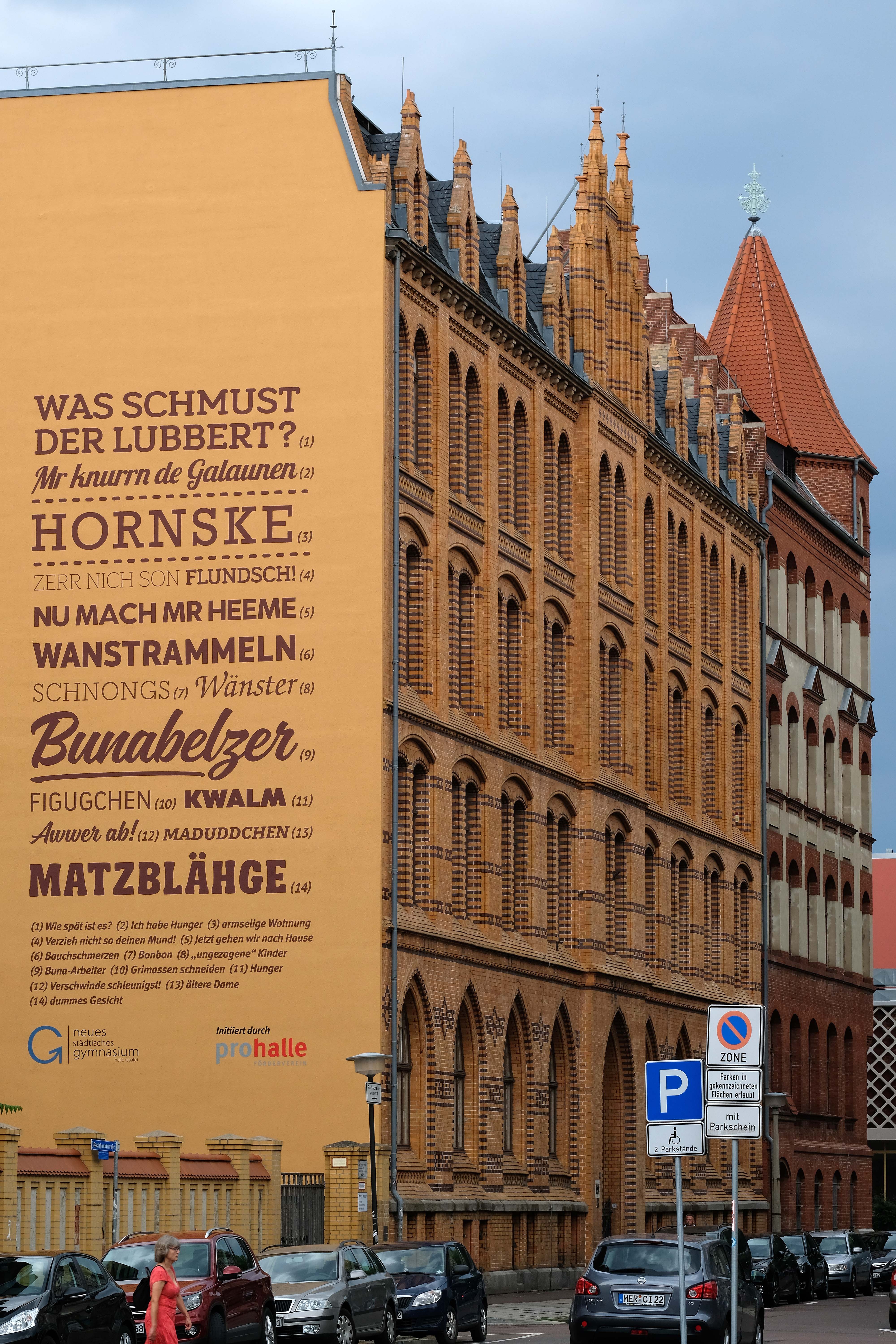 Giebelgestaltung mit halleschen Begriffen im Dialekt in der Dreyhauptstraße 1, Halle vom Hallmarkt aus gesehen. Dreyhauptstraße mit Neuem Städtischen Gymnasium (Dreyhauptschule), Halle (Saale)